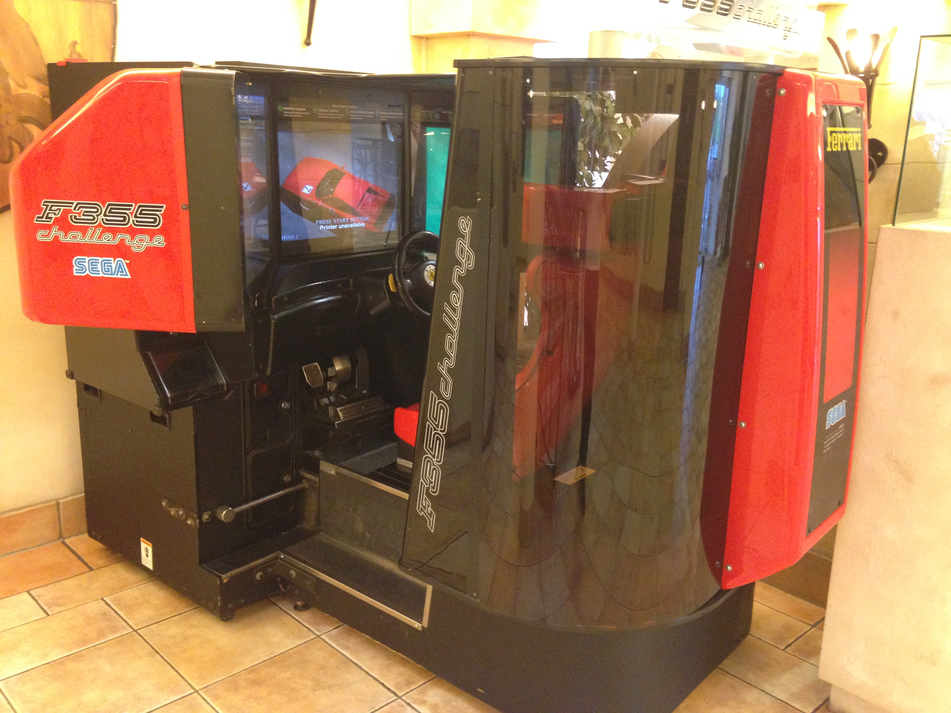 Sega F355 Challange